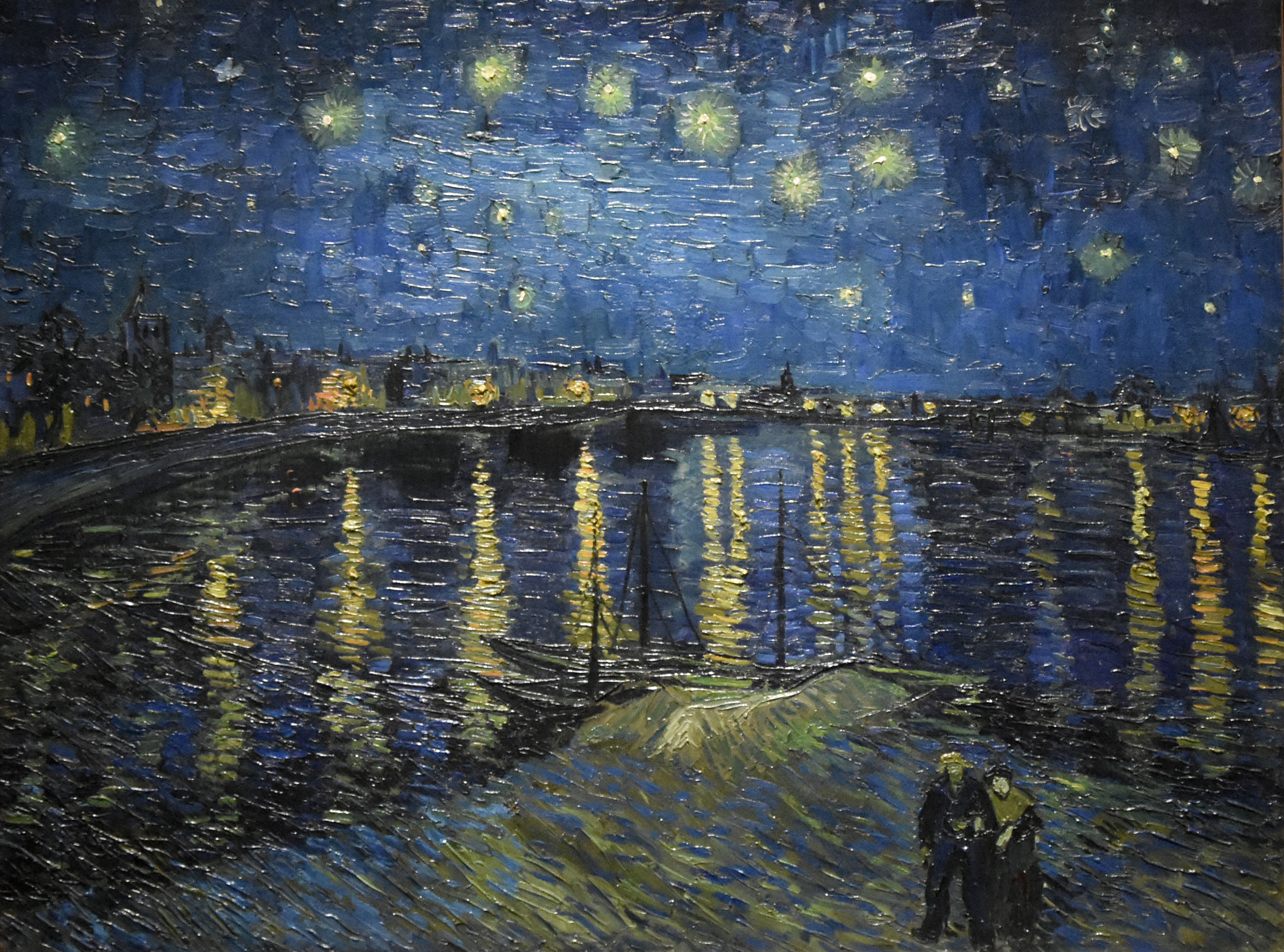 Vincent Van Gogh (1853-1890) Sterrennacht boven de Rhône - Musée d'Orsay Parijs